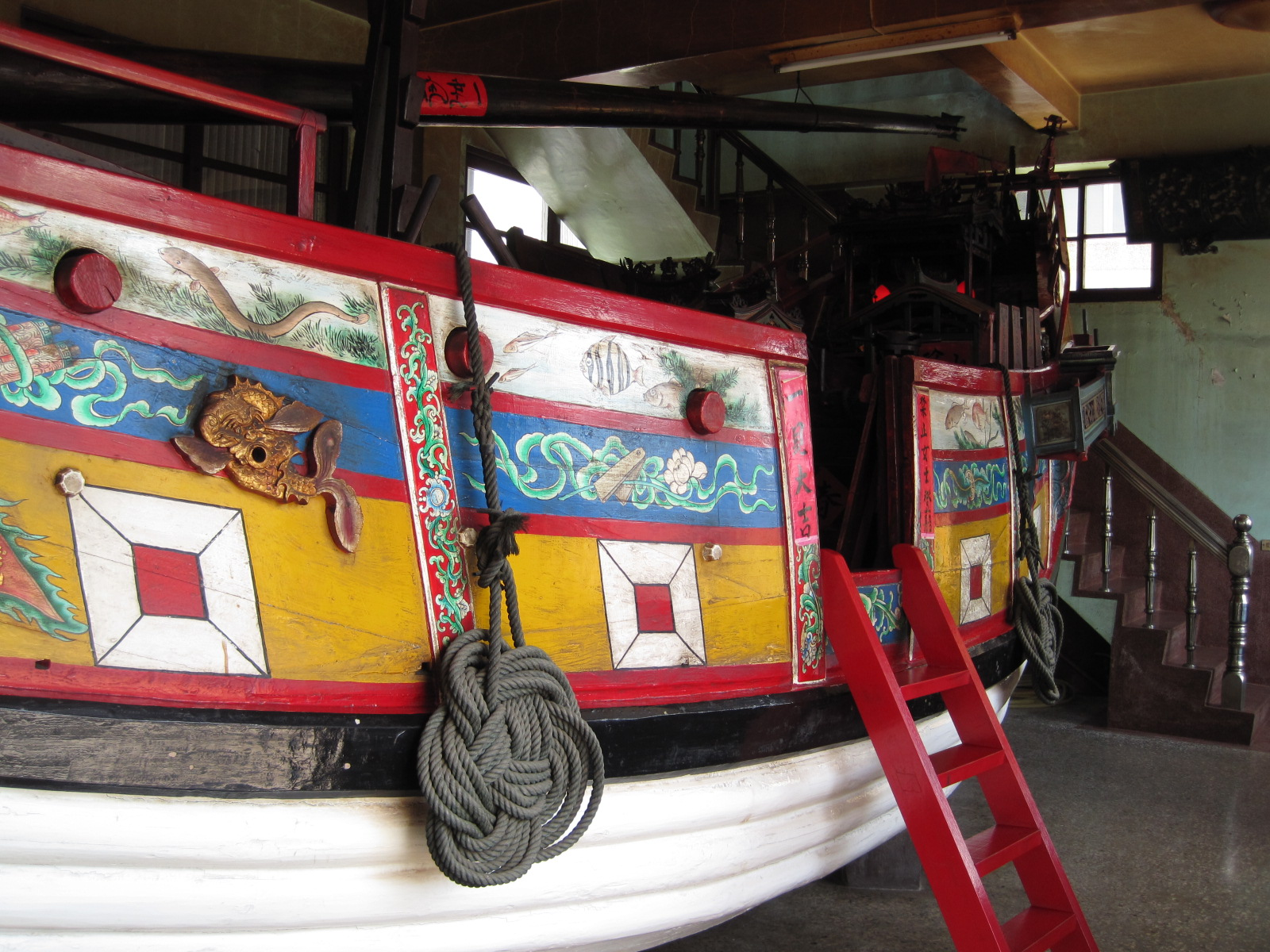 中文（台灣）: 臺南市安平妙壽宮王船室之王船金萬安號。